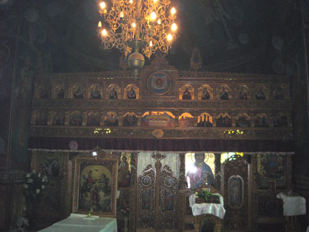 poza a din biserica ortodoxa budesti, autor eu boda marius